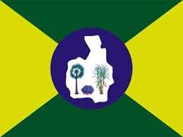 Bandeira de Batalha, Piauí, Brasil.